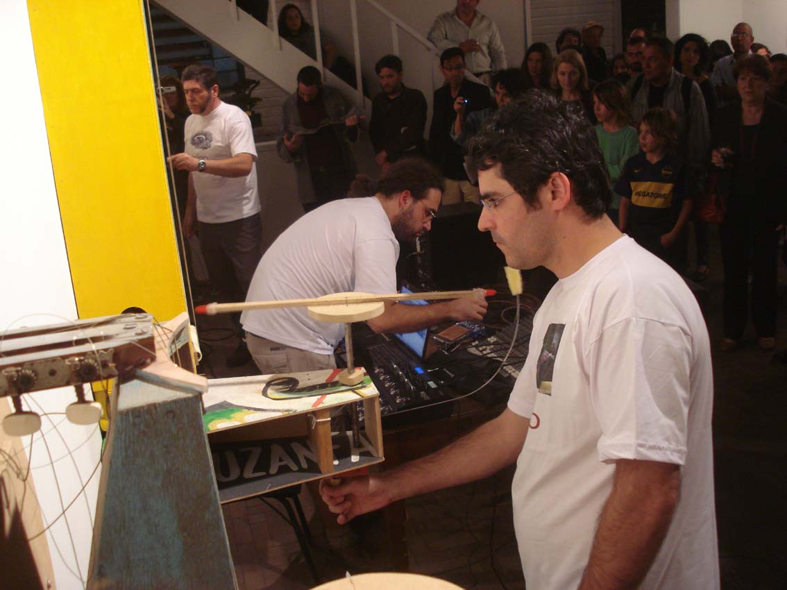 Performance com Chico Machado, Luciano Zanatta e Diego Silveira (todos de camisa branca). Abertura da exposição individual de Chico Machado. Museu do Trabalho, Porto Alegre